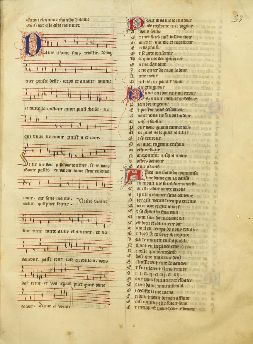 Paris, Bibliothèque Nationale, fonds français 22545